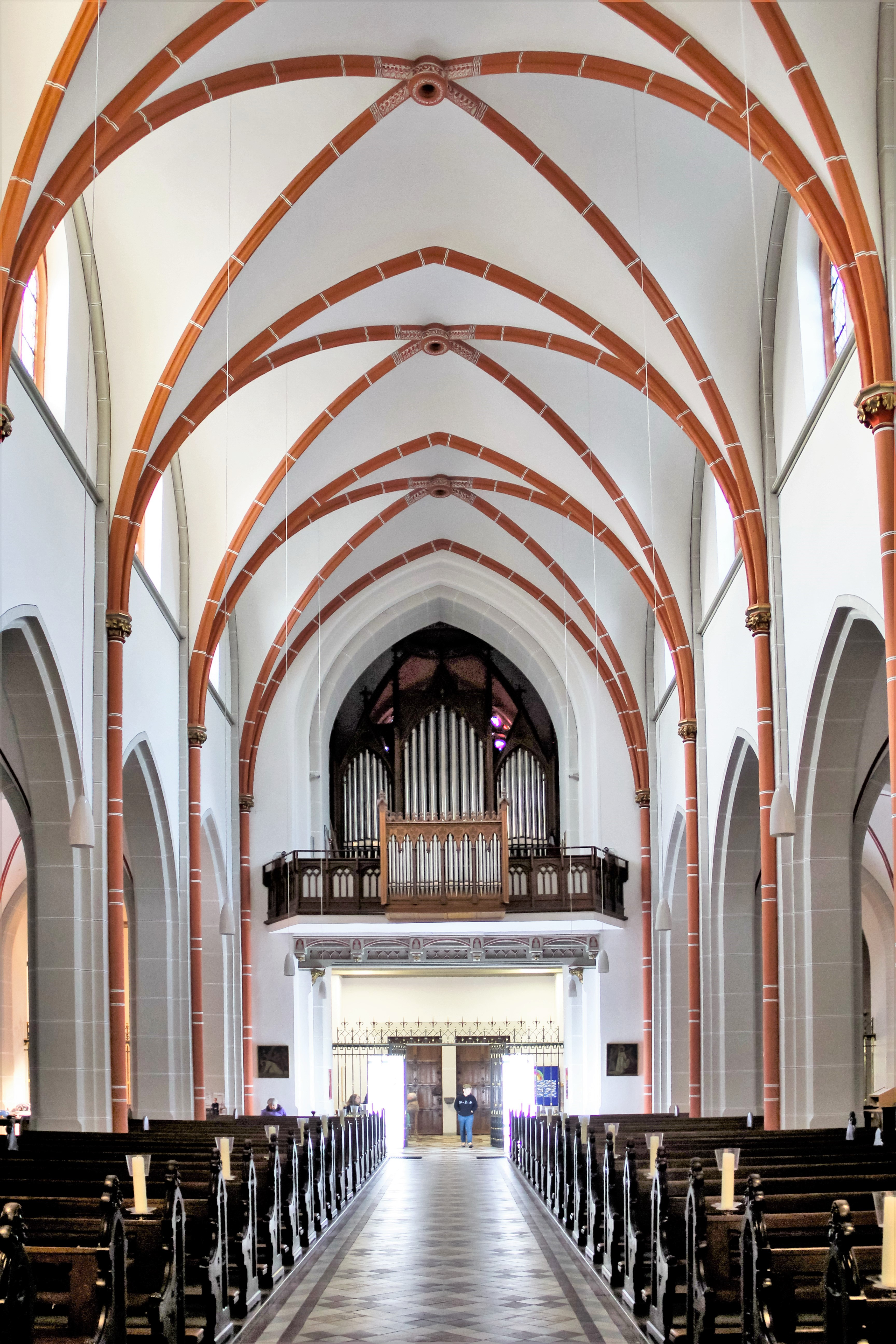 Innenansicht der katholische Pfarrkirche Sankt Josef in Beuel.